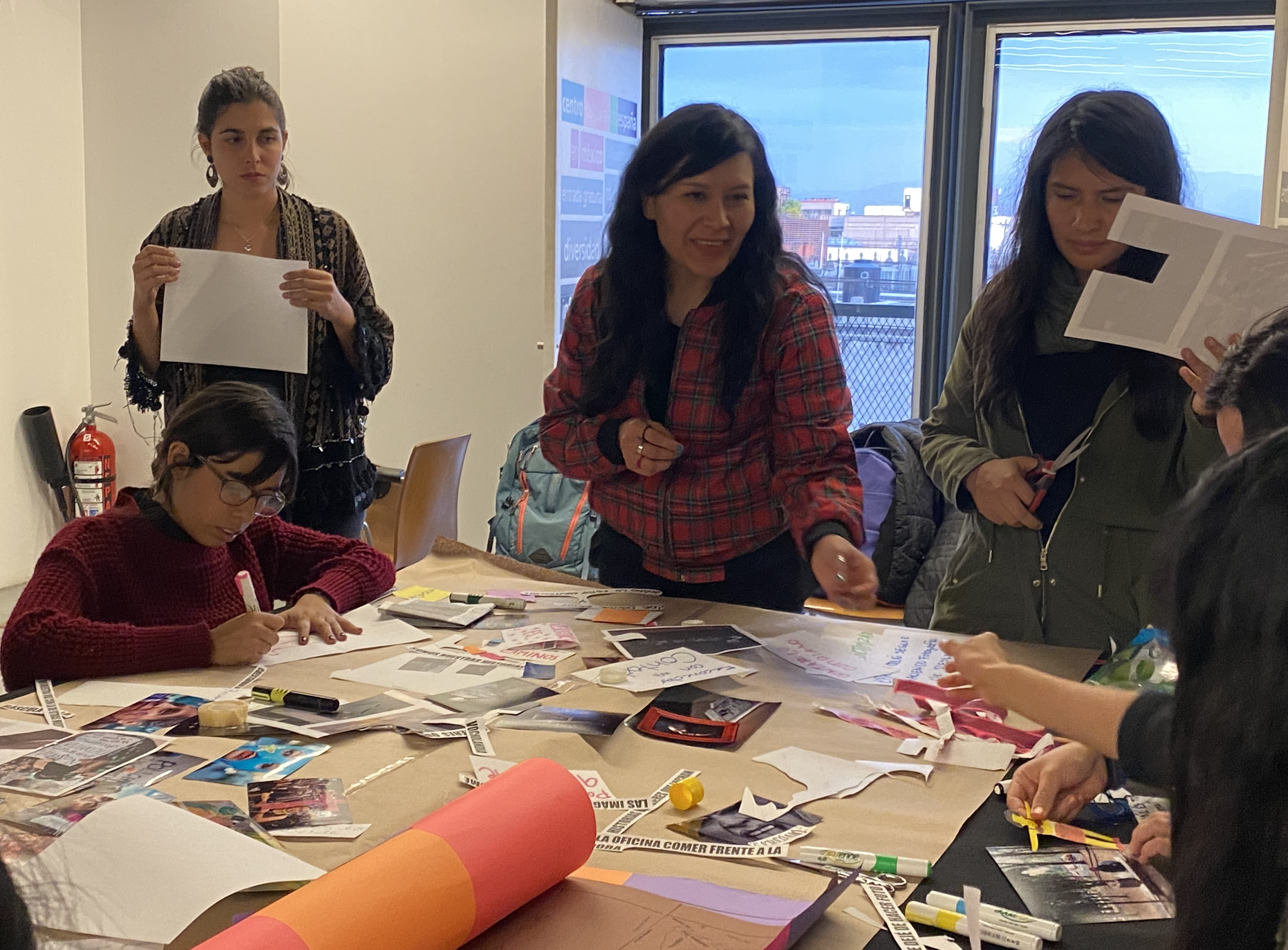 Sonia Madrigal impartiendo un taller de fotografía. Encuentro feminista sobre comunicación. Tejiendo esperanzas y alternativas. Casa de Espańa en Ciudad de México.